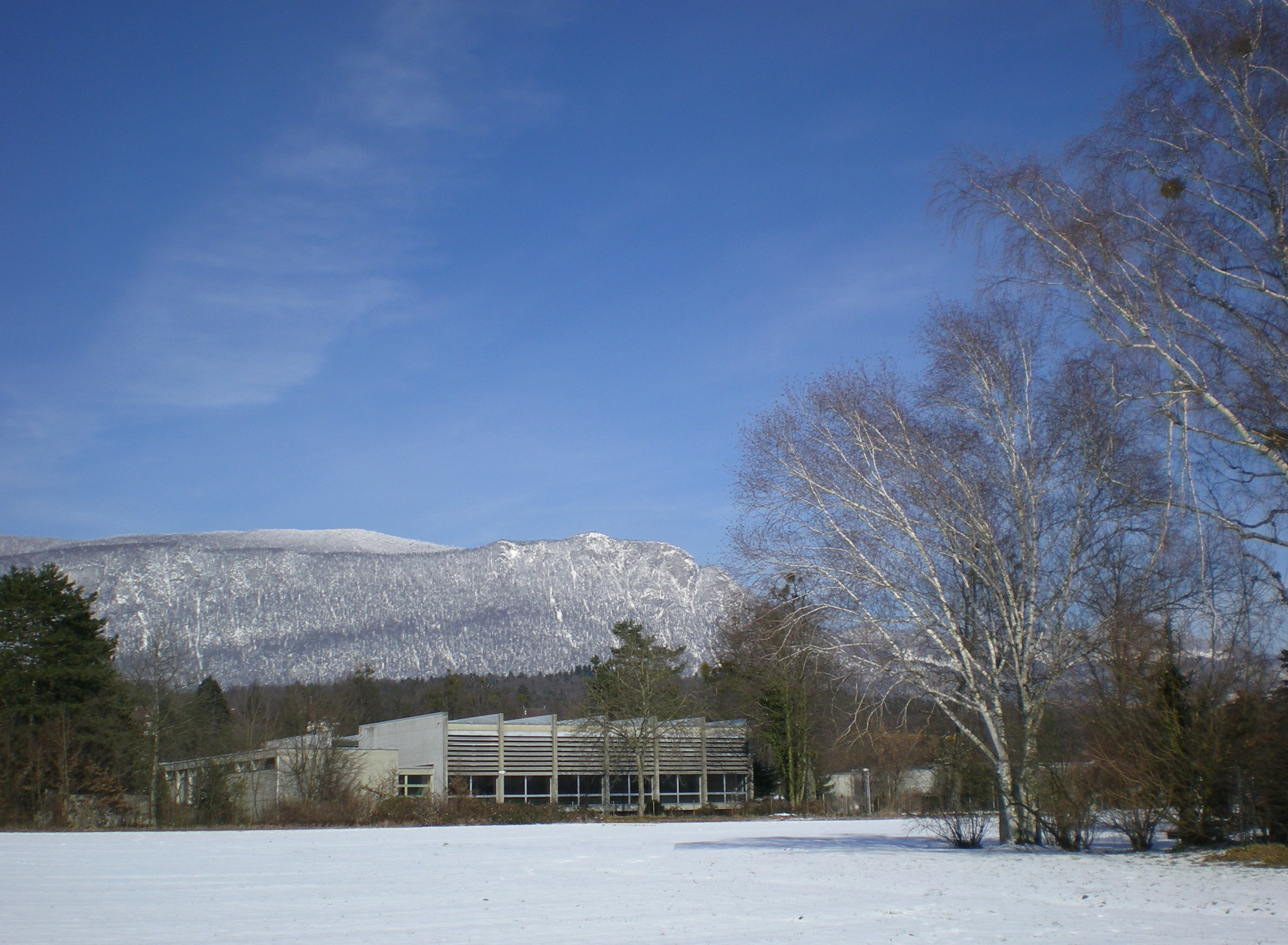 Kantonsschule Solothurn von Süden